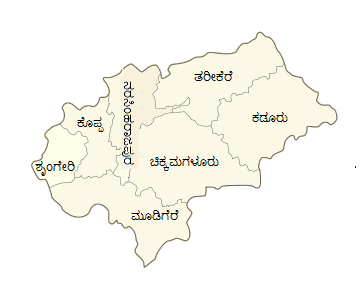 ಕನ್ನಡ: ಚಿಕ್ಕಮಗಳೂರು ಜಿಲ್ಲೆಯ ತಾಲ್ಲೂಕುಗಳು.